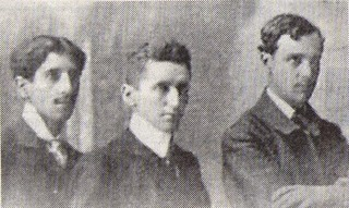 victor domingo silva, Carlos pezoa Veliz y Augusto D´halmar